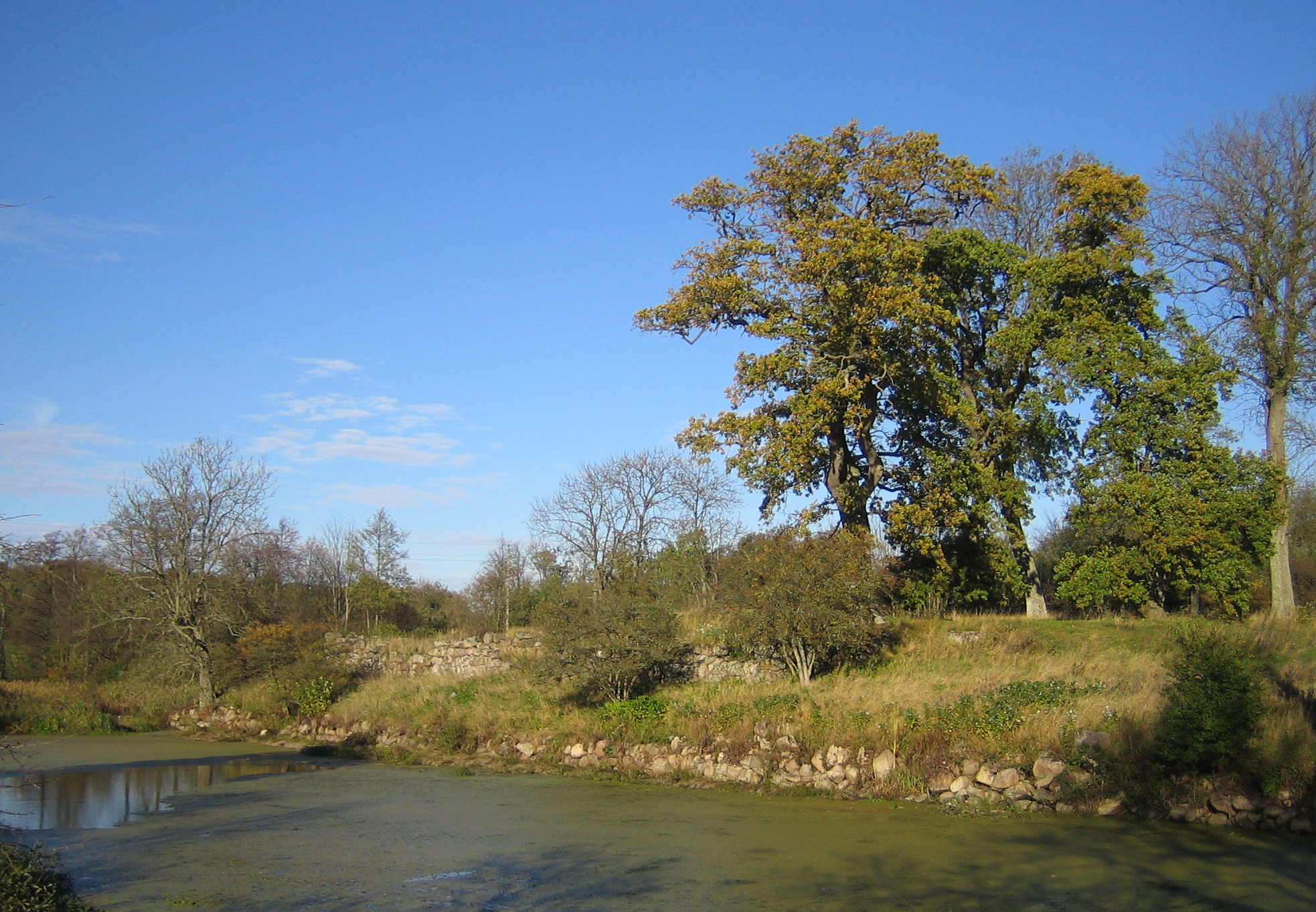 Stjärneholm castle ruins, Skurup, Sweden.